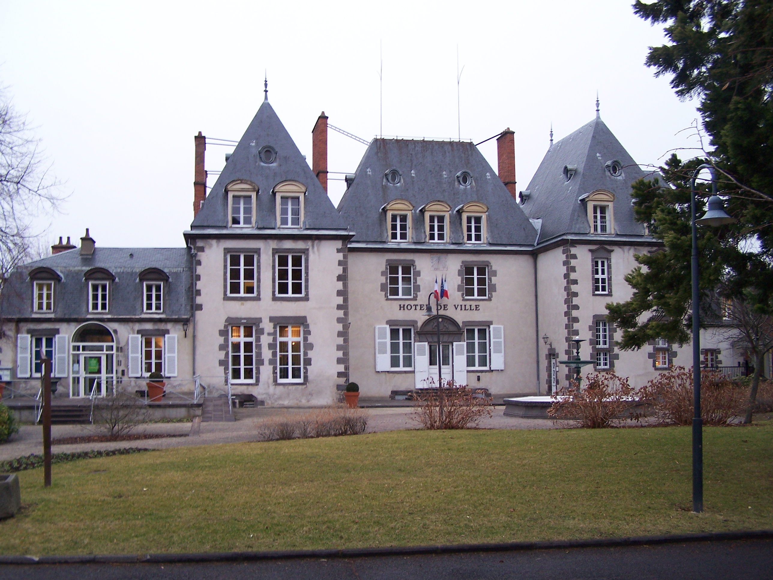 Mairie de Romagnat (63540) Chateau de Bezance